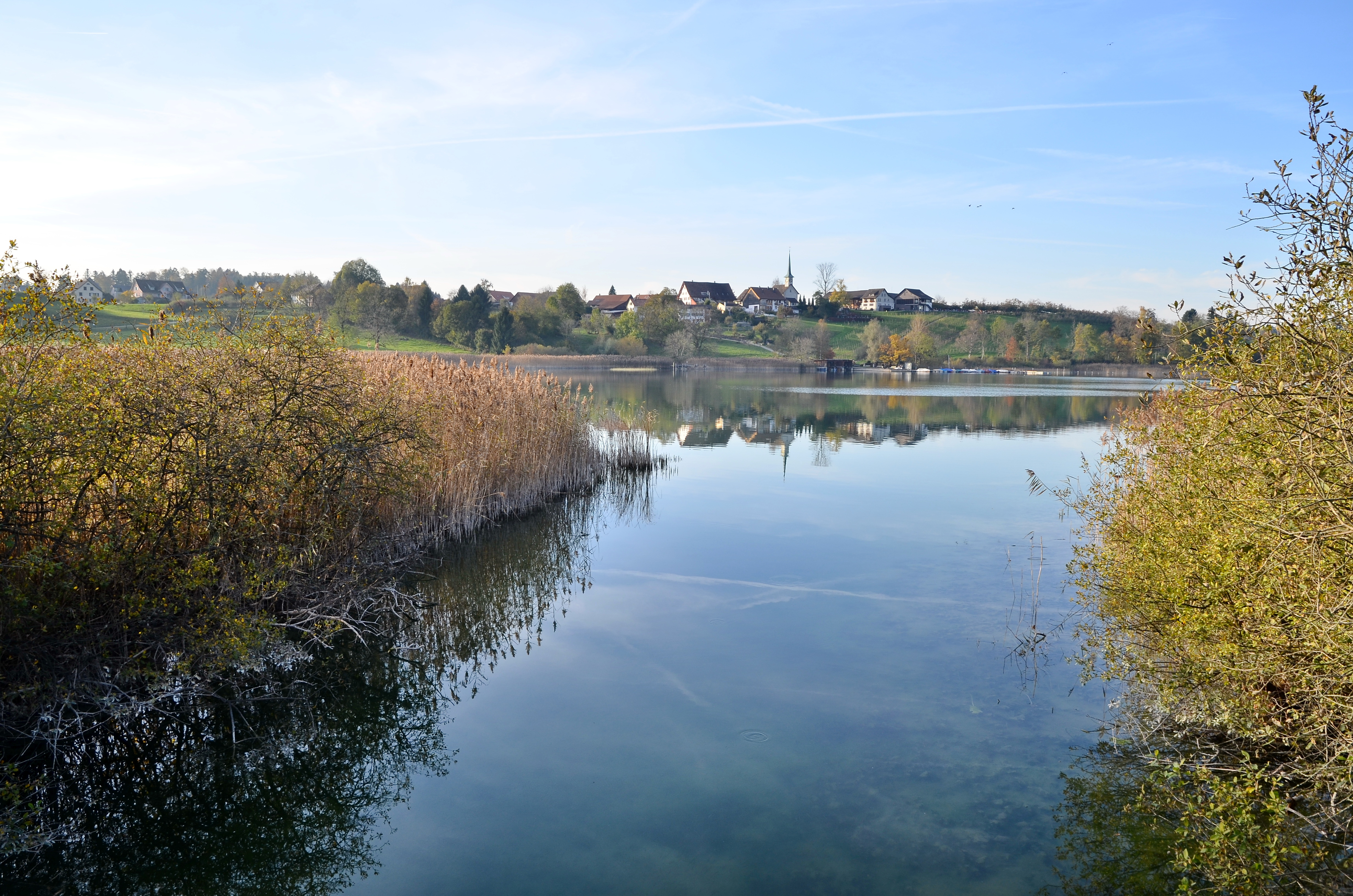 Ustermer Aa at Robenhausen (Robenhuserriet) in Wetzikon (Switzerland), Seegräben in the background.